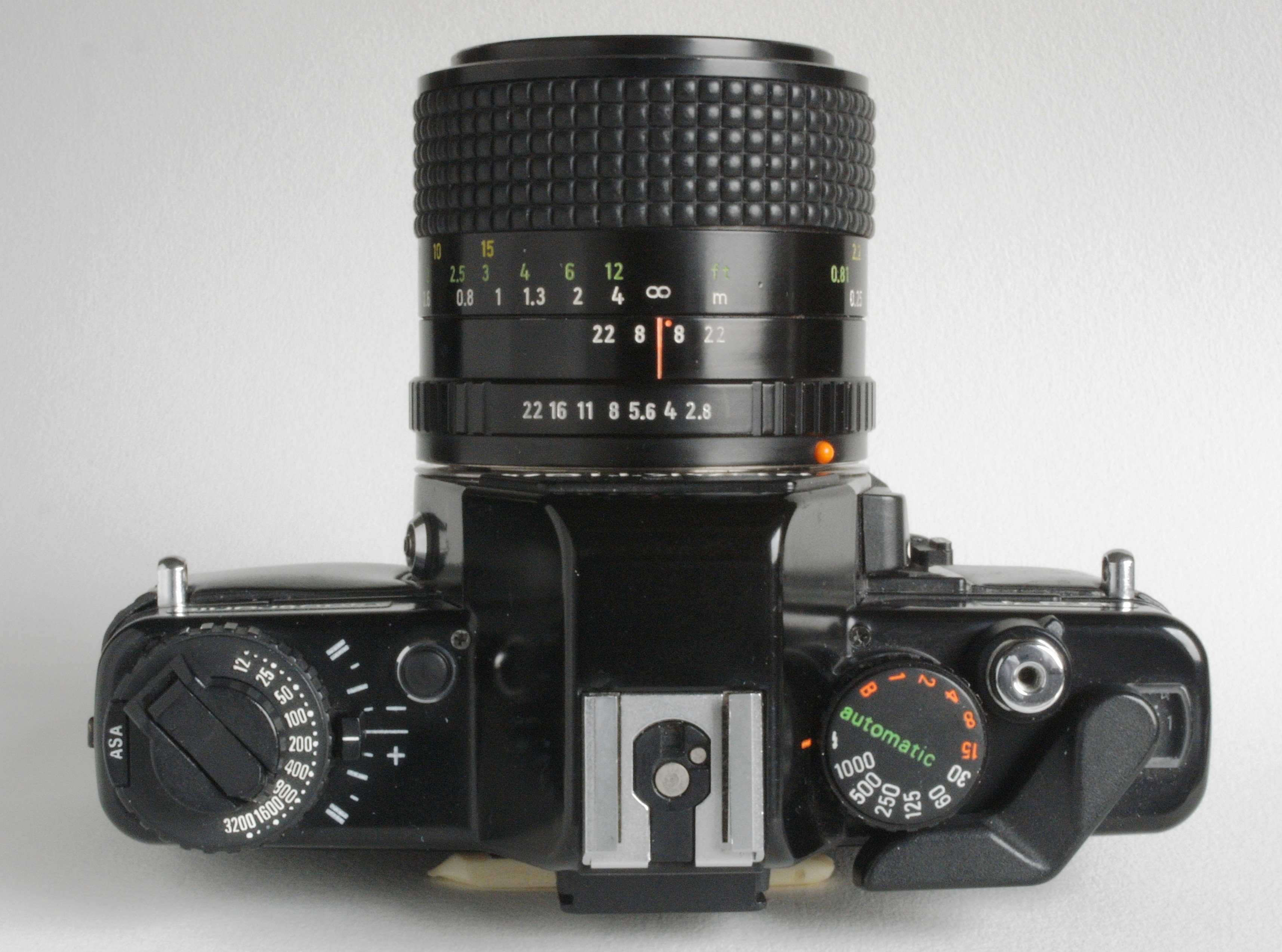 Praktica BC 1 electronic, Kopfansicht